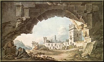 Dziedziniec zamku w Kazimierzu Dolnym, widok od stony bramy - akwarela Zygmunta Vogla z 1792 r.